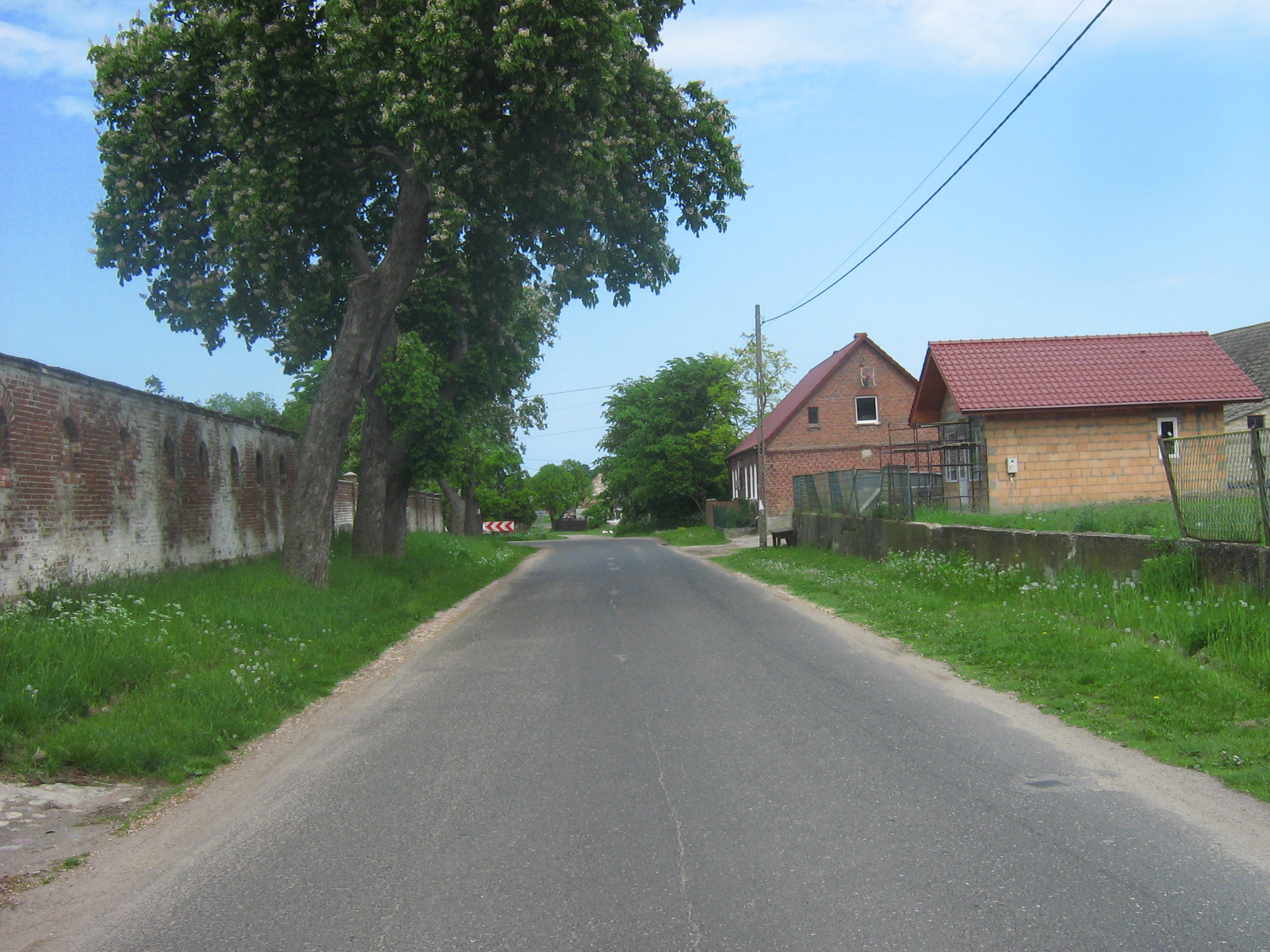 Sibin